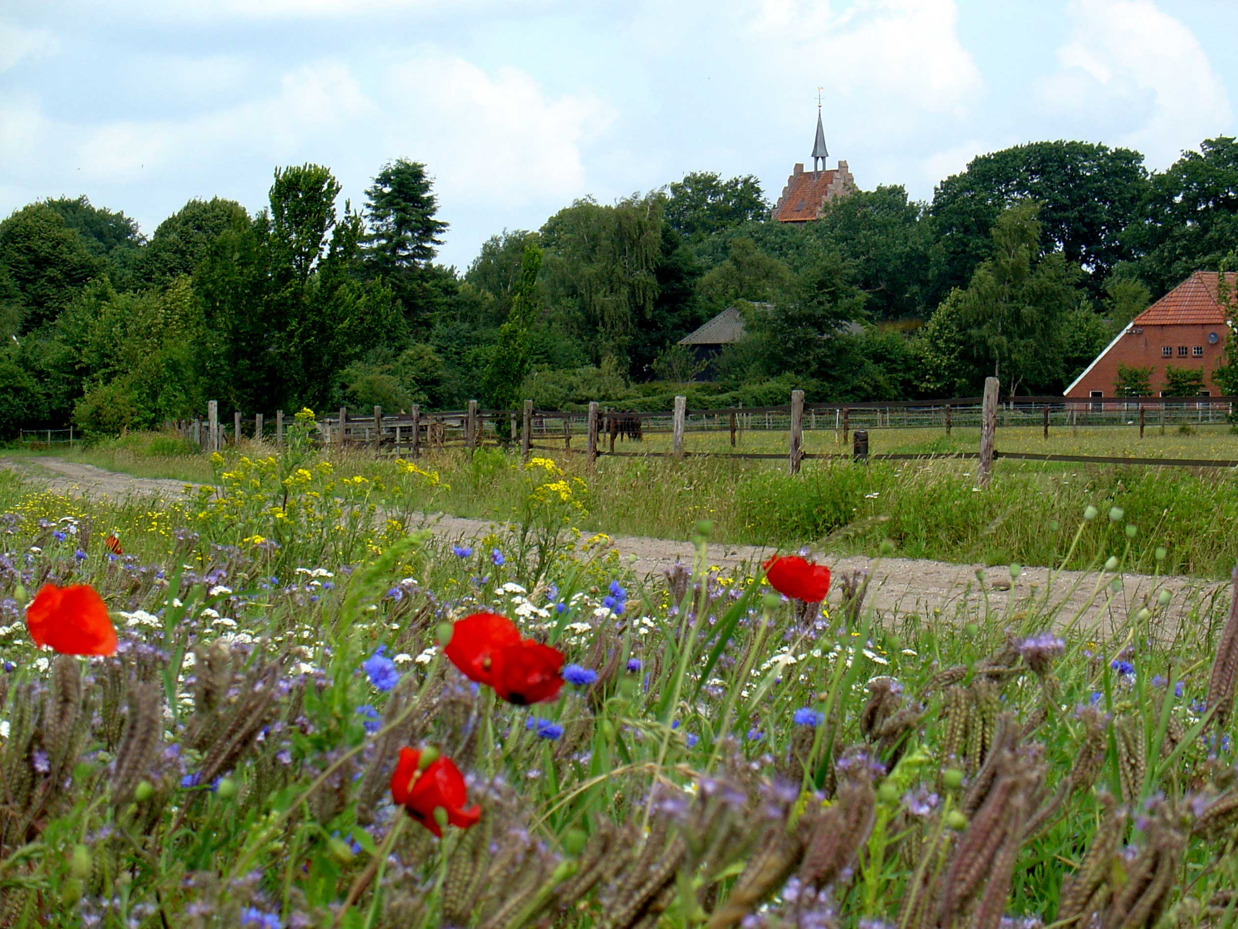 Zicht op Anloo, vanaf de zuides gezien